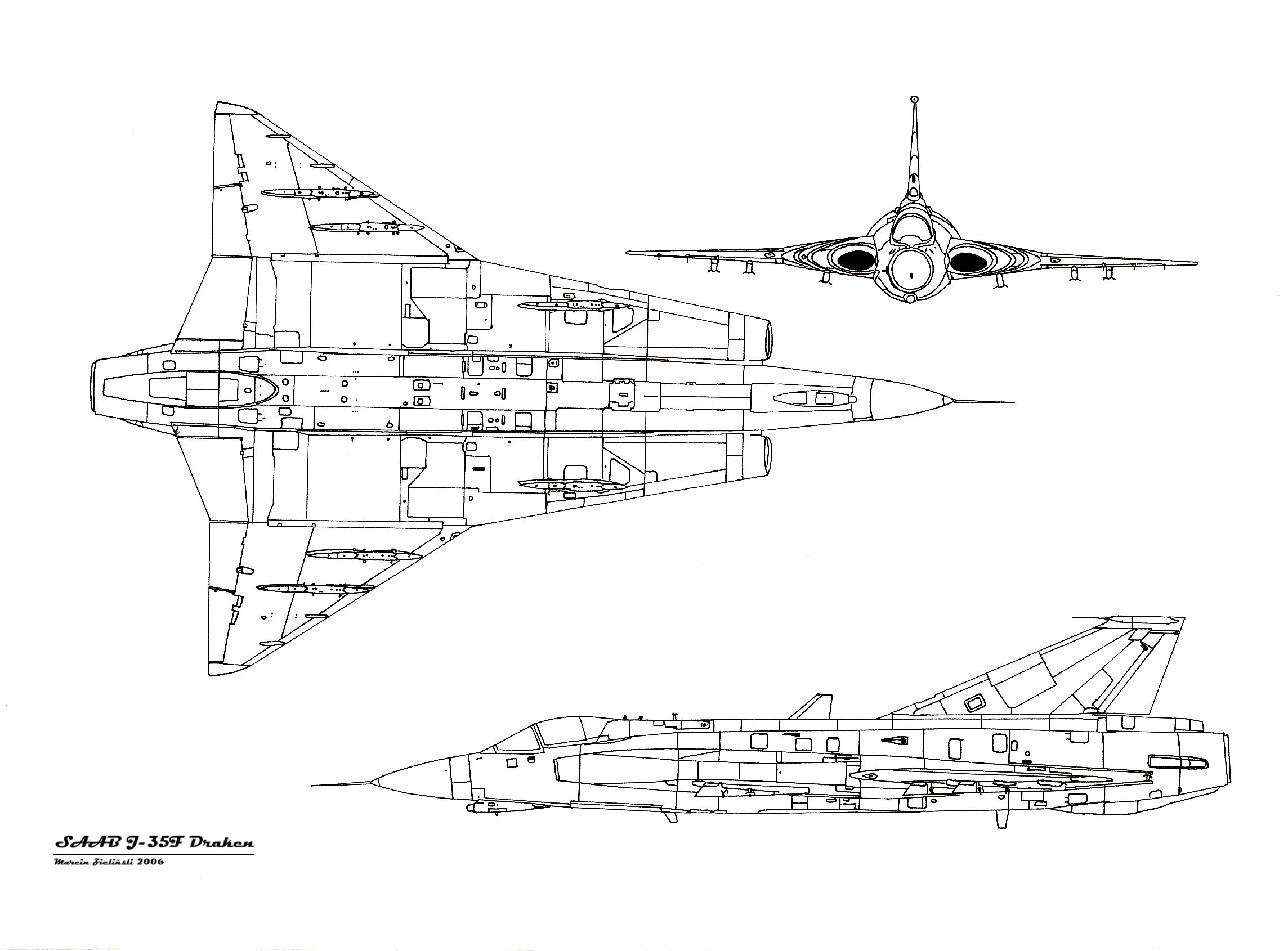 A 3-view drawing of SAAB J-=35F Draken.